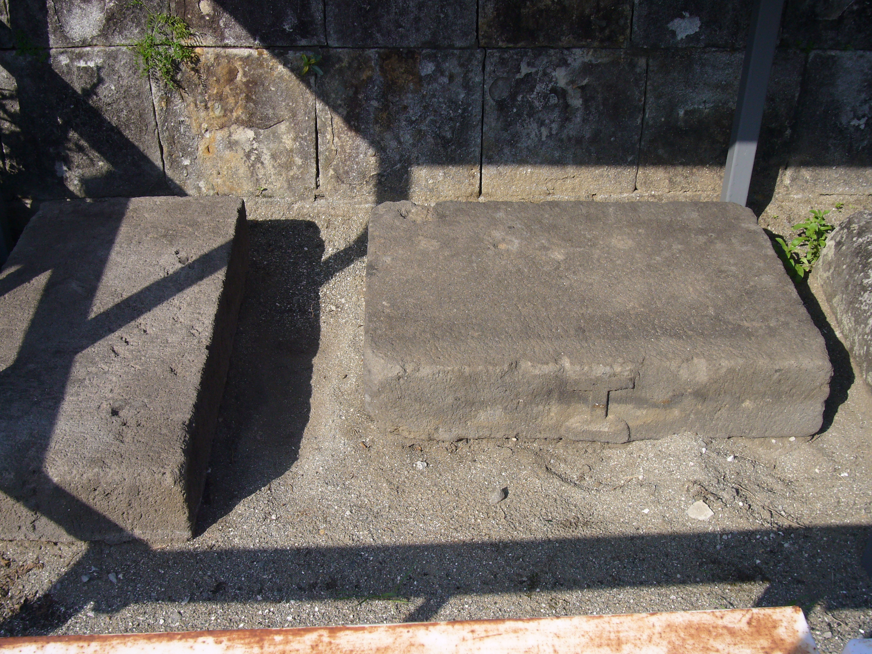 Photograph of Christian tombstones in Suzaki,Kazusa,Nagasaki,Japan.